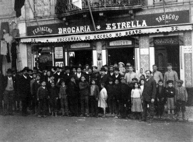 Drogaria Estrela - Beato (Ref: A8883)